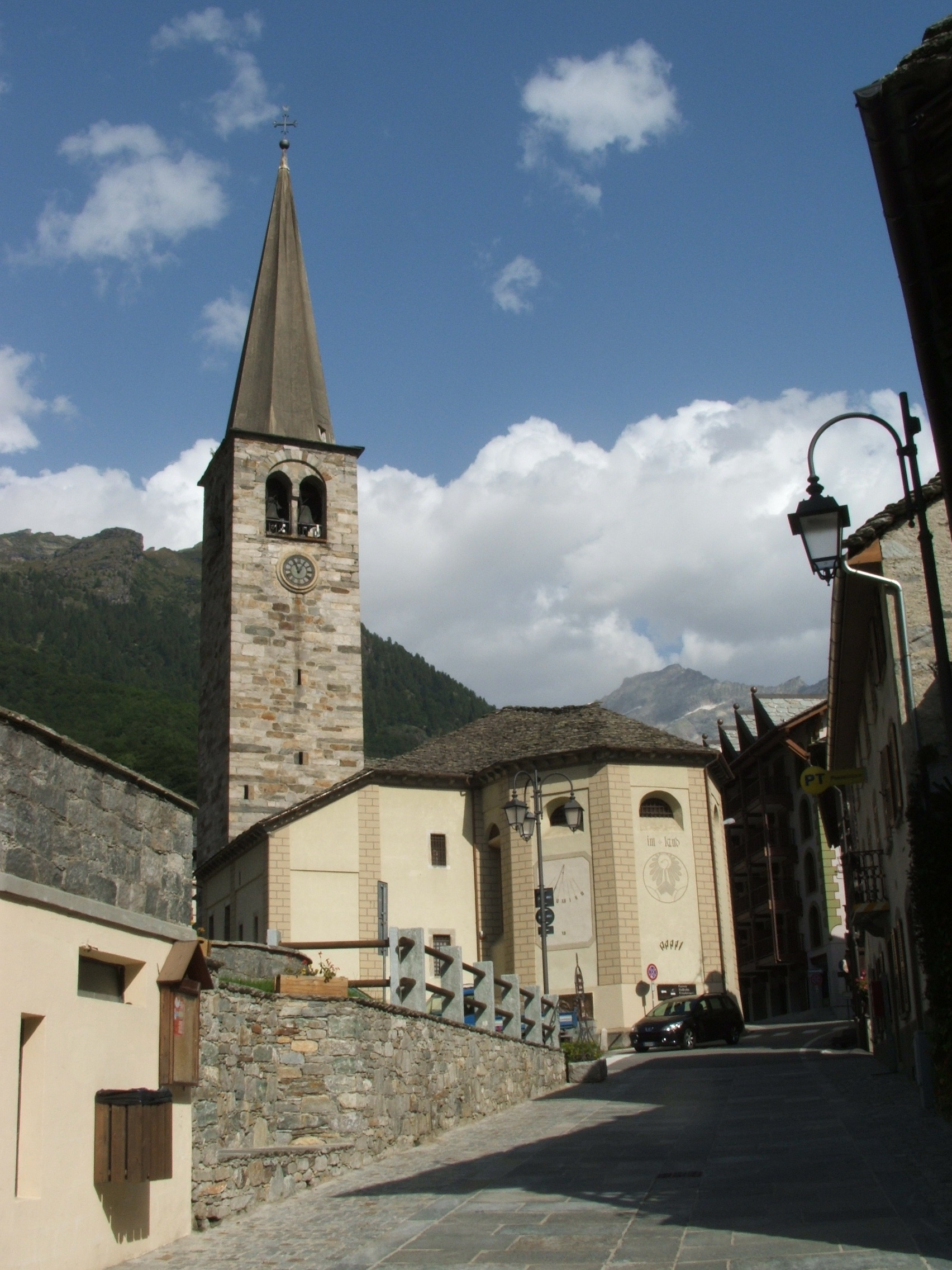 Immagine da Alagna Valsesia